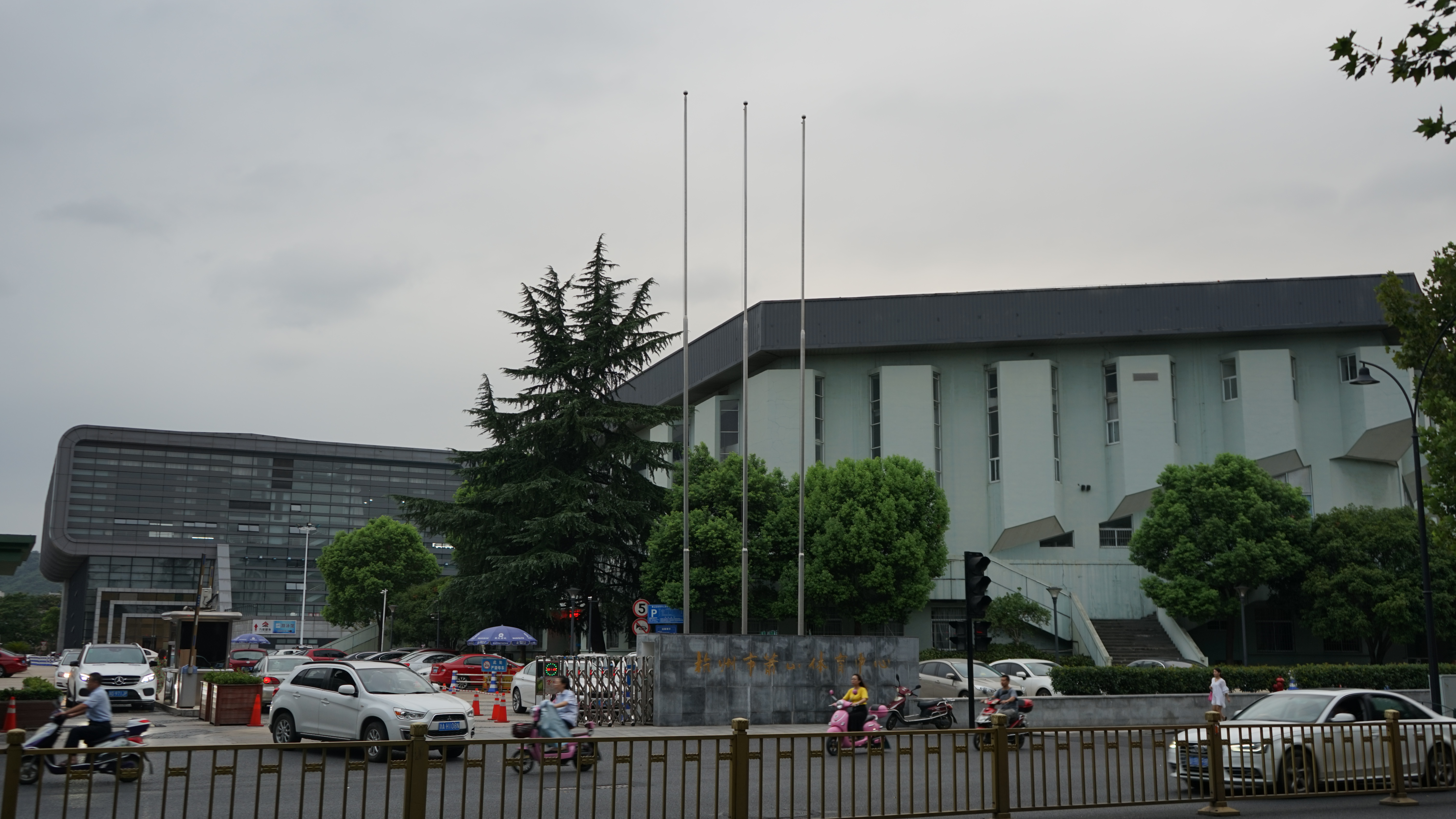 中文（中国大陆）: 杭州萧山体育中心